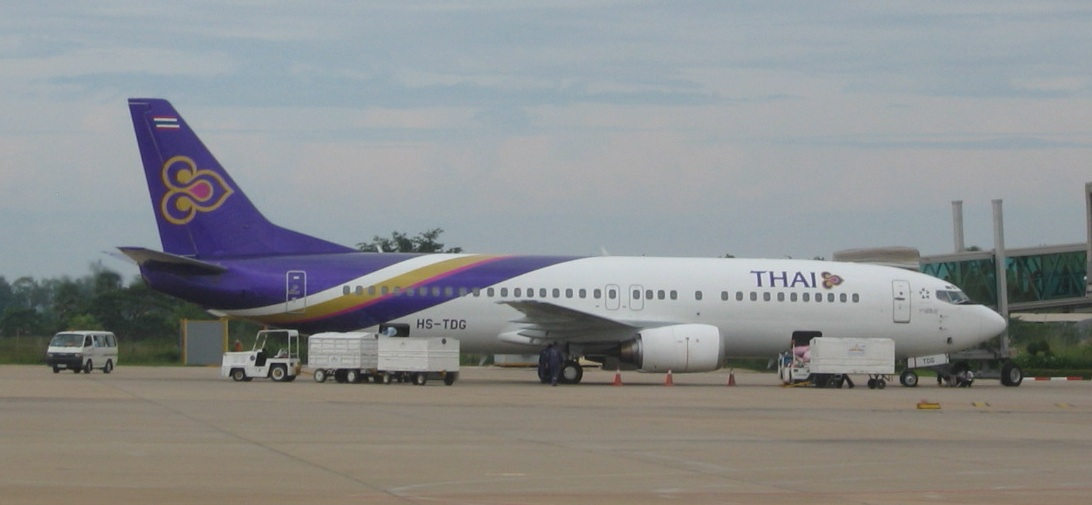 Boeing 737-400 der Thai Airways International am Flughafen Phnom Penh, Kambodscha